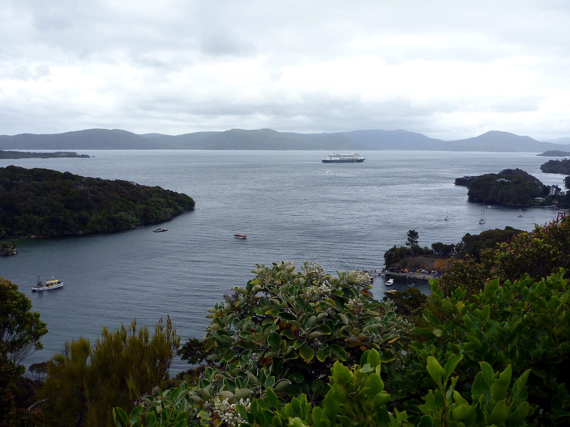 Die Paterson Bucht geht weit in Stewart Island (Neuseeland) hinein